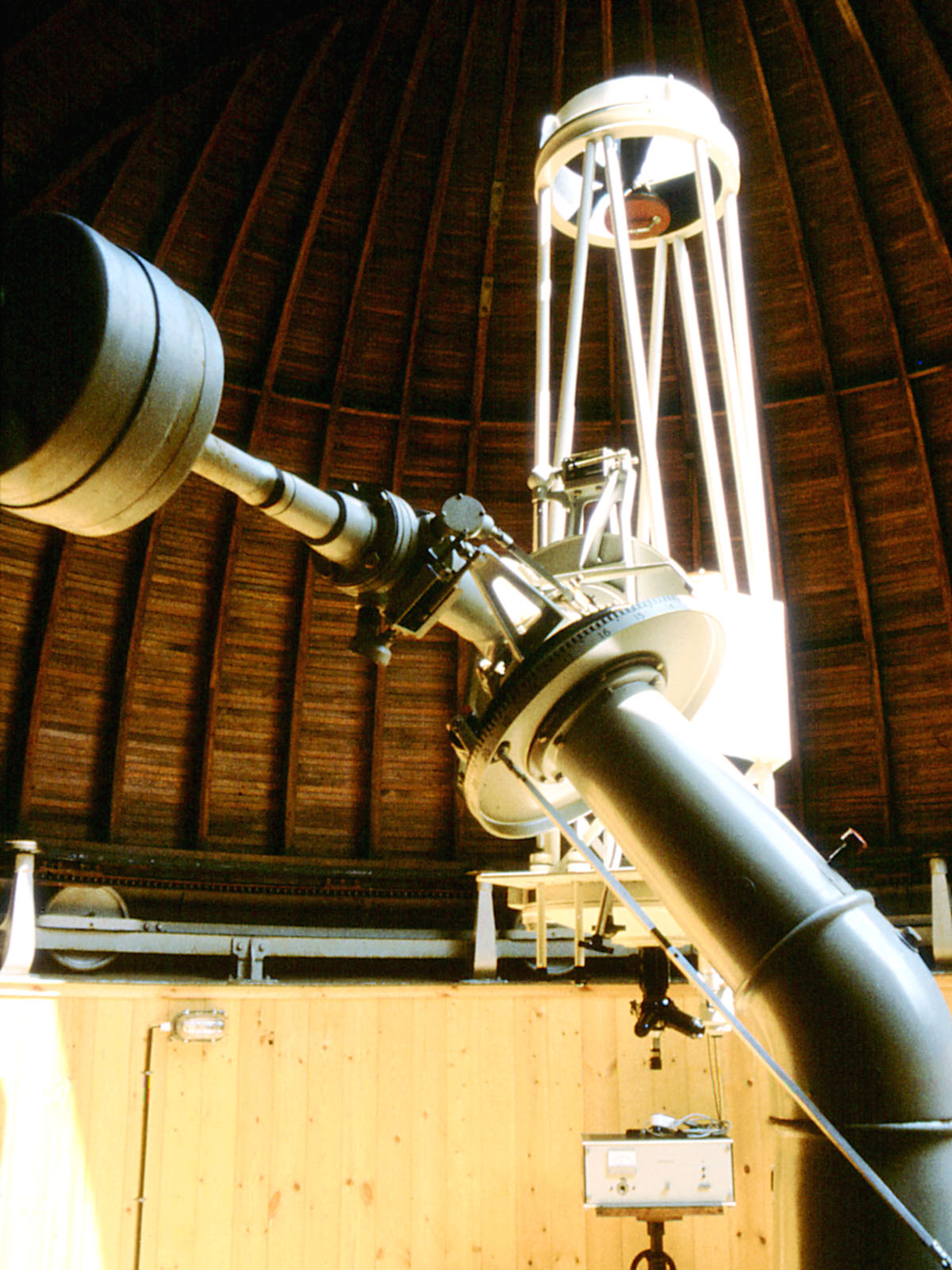 50-cm-Cassegrainteleskop der Forststernwarte bei Jena, einer Aussenstelle der Volkssternwarte Urania Jena